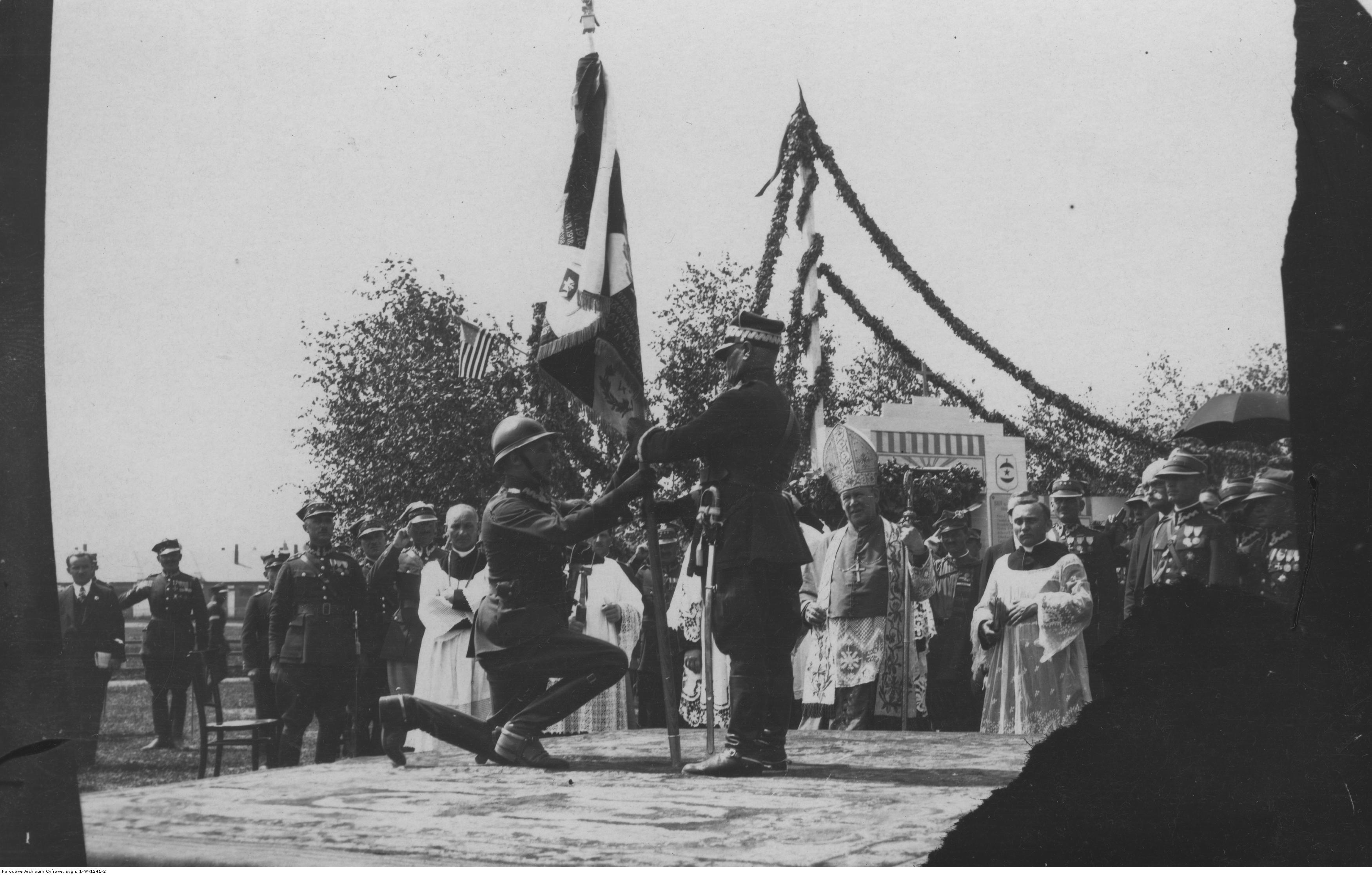 Wręczenie sztandaru 43 Pułkowi Piechoty Legionu Bajończyków w Dubnie. Gen. Jan Romer wręcza sztandar dowódcy pułku płk. Benedyktowi Chłusewiczowi. Koncern Ilustrowany Kurier Codzienny - Archiwum Ilustracji. Sygnatura: 1-W-1241-2